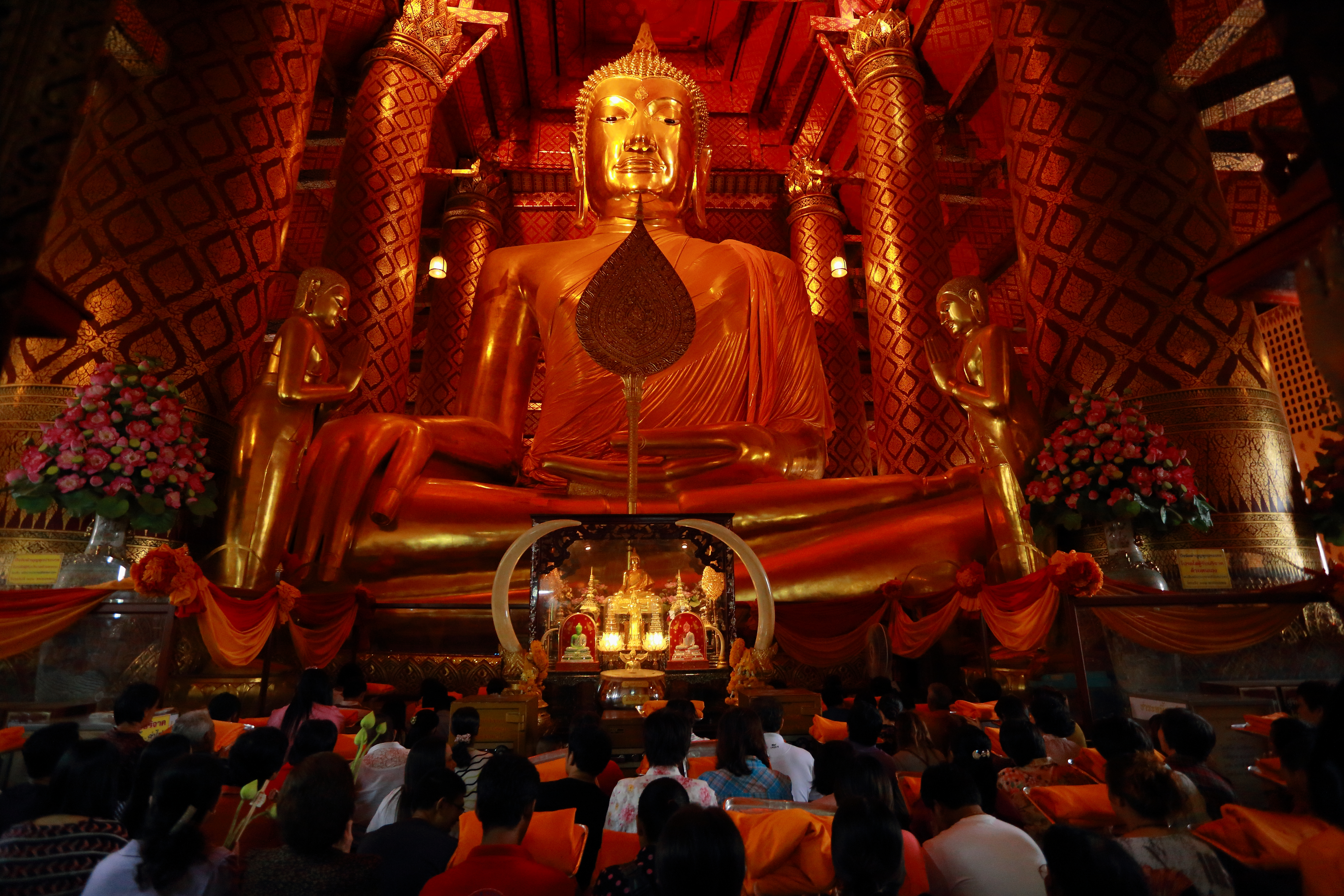 วัดพนัญเชิง ตั้งอยู่ที่หมู่ 2 ตำบลคลองสวนพลู อำเภอพระนครศรีอยุธยา จังหวัดพระนครศรีอยุธยา เป็นพระอารามหลวง วัดพนัญเชิง เป็นวัดที่มีประวัติอันยาวนาน ก่อสร้างก่อนการสถาปนากรุงศรีอยุธยา และไม่ปรากฏหลักฐานที่แน่ชัดว่าใครเป็นผู้สร้าง ตามหนังสือพงศาวดารเหนือกล่าวว่า พระเจ้าสายน้ำผึ้งเป็นผู้สร้าง และพระราชทานนามว่า วัดเจ้าพระนางเชิง[ต้องการอ้างอิง] และพระราชพงศาวดารกรุงเก่า ฉบับหลวงประเสริฐอักษรนิติ์กล่าวไว้ว่า ได้สถาปนาพระพุทธรูปพุทธเจ้าพแนงเชิง เมื่อปี พ.ศ. 1867 ซึ่งก่อนพระเจ้าอู่ทองจะสถาปนากรุงศรีอยุธยาถึง 26 ปี [1] พระพุทธไตรรัตนนายก หรือหลวงพ่อซำปอกง เป็นพระพุทธรูปขนาดใหญ่ และใหญ่ที่สุดในพระนครศรีอยุธยา หน้าตักกว้าง 20 เมตรเศษ สูง 19 เมตร เป็นพระพุทธรูปปูนปั้นปางมารวิชัย เคยได้รับความเสียหายในสมัยเสียกรุง แต่ก็ได้รับการบูรณะซ่อมแซมมาโดยตลอด จนกระทั่งในสมัยพระบาทสมเด็จพระจอมเกล้าเจ้าอยู่หัวแห่งกรุงรัตนโกสินทร์ เมื่อ พ.ศ. 2497 ได้โปรดเกล้าให้บูรณะใหม่หมดทั้งองค์ และพระราชทานนามใหม่ว่า พระพุทธไตรรัตนนายก หรือที่รู้จักกันในหมู่พุทธศาสนิกชนชาวไทยเชื้อสายจีนว่า หลวงพ่อซำปอกง[ต้องการอ้างอิง] คำว่า พแนงเชิง มีความหมายว่า นั่งขัดสมาธิ ฉะนั้น คำว่า วัดพนัญเชิง / วัดพระแนงเชิง หรือ / วัดพระเจ้าพแนงเชิง จึงหมายถึงวัดแห่งพระพุทธรูปนั่งปางมารวิชัยคือ หลวงพ่อโต หรือ พระพุทธไตรรัตนนายก นั้นเอง หรืออาจสืบเนื่องมาจากตำนานเรื่องพระนางสร้อยดอกหมาก คือ เมื่อพระนางสร้อยดอกหมากกลั้นใจตายนั้น พระนางคงนั่งขัดสมาธิ เพราะชาวจีนนิยมนั่งขัดสมาธิมากว่านั่งพับเพียบจึงนำมาใช้เรียกชื่อวัด บางคนก็เรียกว่า วัดพระนางเอาเชิง ตามสาเหตุที่ทำให้พระนางถึงแก่ชีวิต ฉะนั้น ถ้าเรียกนามวัดตามความหมายของคำว่า วัดพนัญเชิง ก็ย่อมหมายความถึงวัดที่มีพระพุทธรูปนั่งขัดสมาธิ คือหลวงพ่อโต ( อ้างอิงจากประวัติวัดพนัญเชิงข้อมูลของทางวัดในปัจจุบัน )